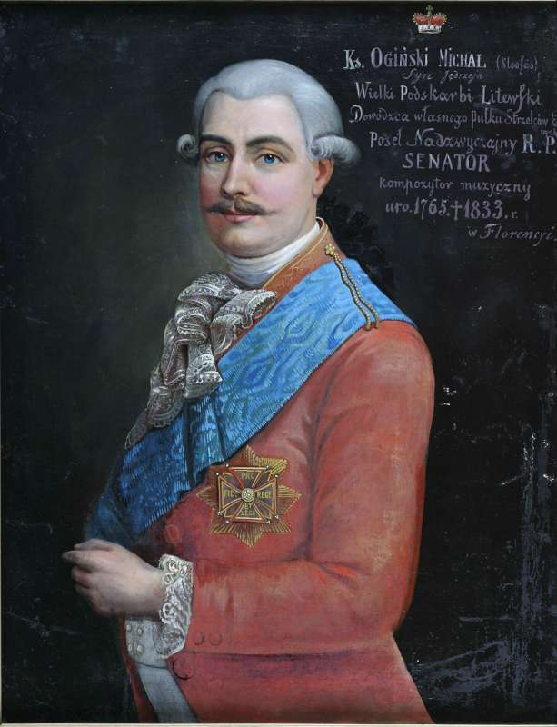 Беларуская (тарашкевіца): Партрэт Міхала Клеафаса Агінскага (Michał Kleafas Aginski)